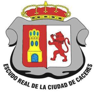 Escudo Real de la ciudad de Cáceres, Antioquia